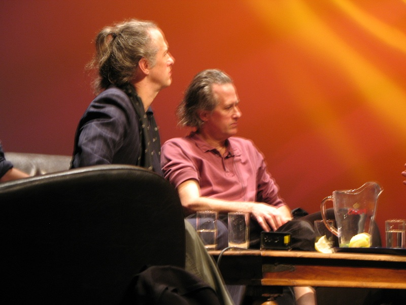 Los hermanos Quay participaren en un panel. Para quien no sepa, son unos cineastas del carajo a quienes admiro mucho. Ellos son tan extraños como sus películas. Gemelos idénticos que hablan a dos voces.